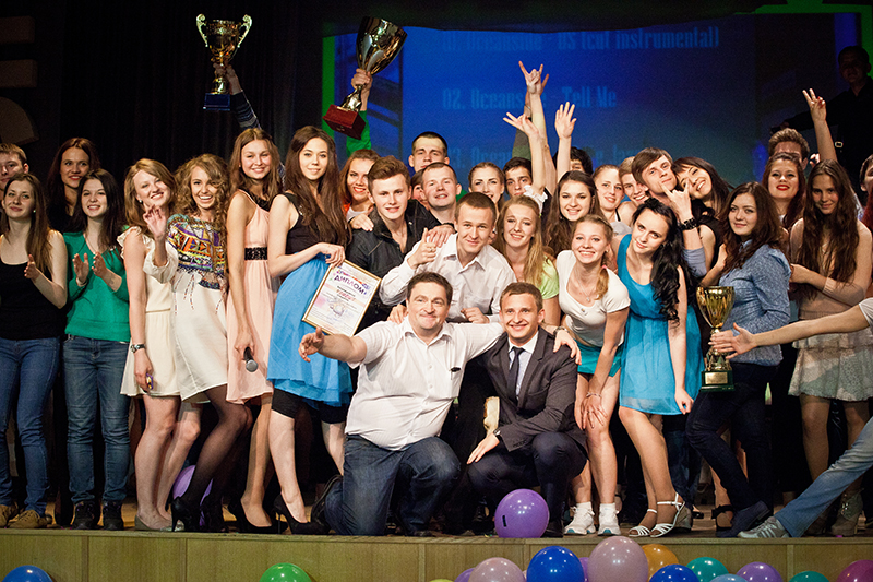 Внеучебная деятельность студентов Университета ИТМО